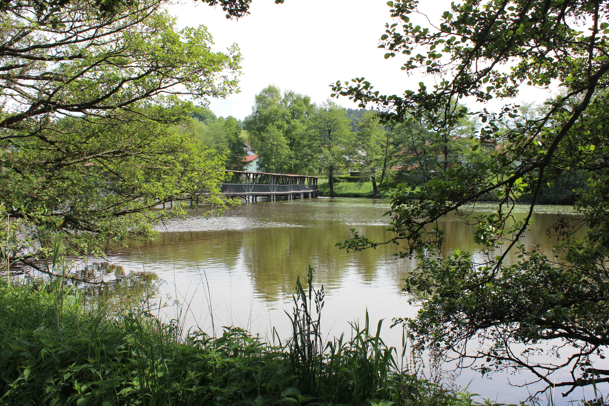 Der Beckenweiher gehört zum Naturschutzgebiet Weiherlandschaft Wiesenfelden im Landkreis Straubing-Bogen. Er kann auf einem Wanderweg umrundet und auf einem überdachten Steg überschritten werden. NSG-00622.01.